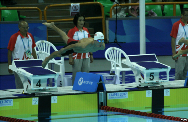 中国游泳选手马日欣2017年8月23日参加台北世大运男子800米自由式比赛 （美国之音黎堡摄）